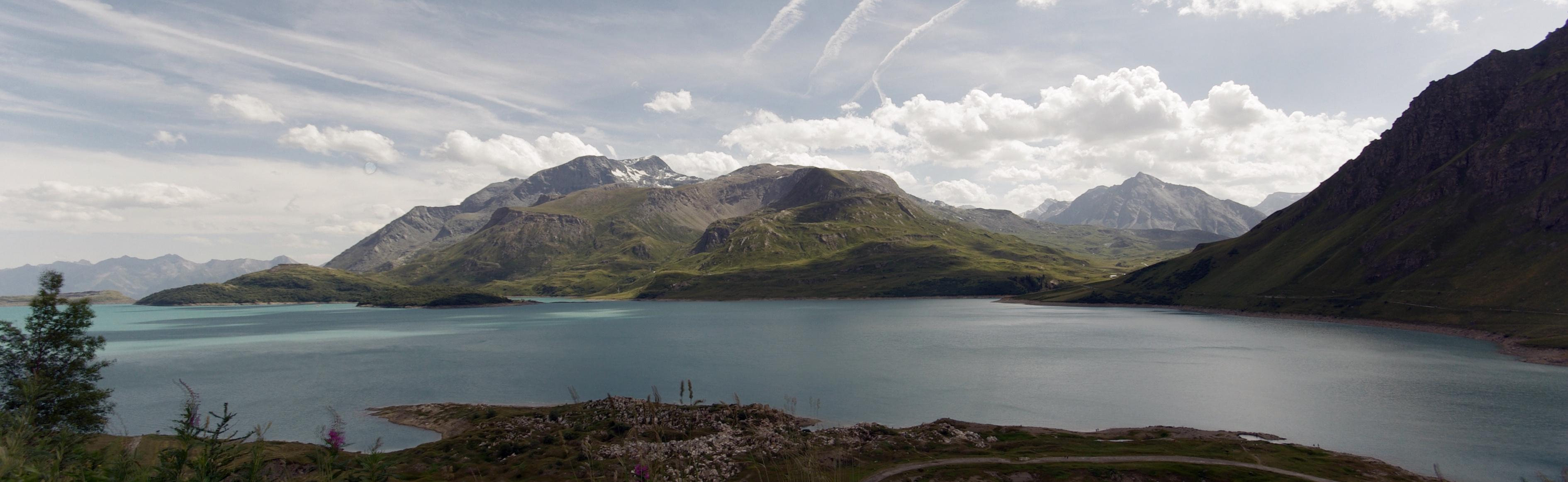 Hdr très doux du lac du Mont Cenis.